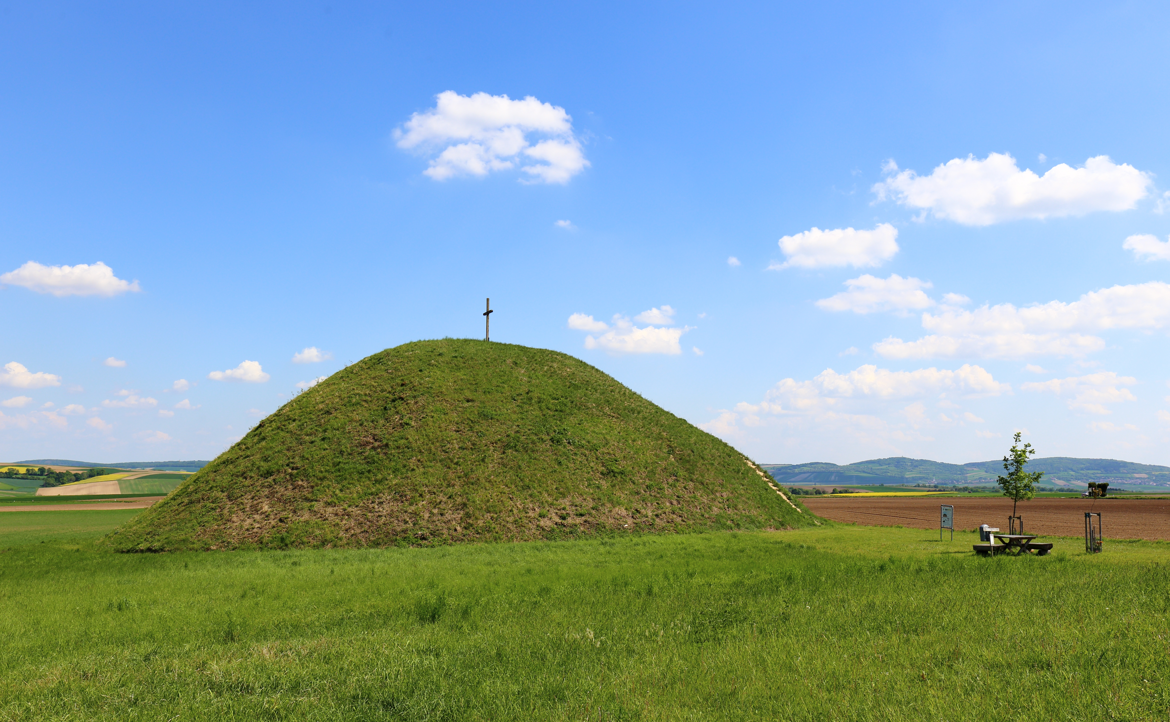 Hügelgrab bzw. Grabhügel (Tumulus), auch Leeberg von Großmugl bezeichnet, in der niederösterreichischen Marktgemeinde Großmugl.Der Tumulus wurde während der Hallstattzeit (800 bis 450 v. Chr.) aufgeschüttet und ist mit einem Durchmesser von rd. 50 Meter und einer Höhe von etwa 14 Meter einer der Größten in Mitteleuropa. Das Hügelgrab ist auch namensgebend für den Ort Großmugl: «großer Mugl» (Hügel).